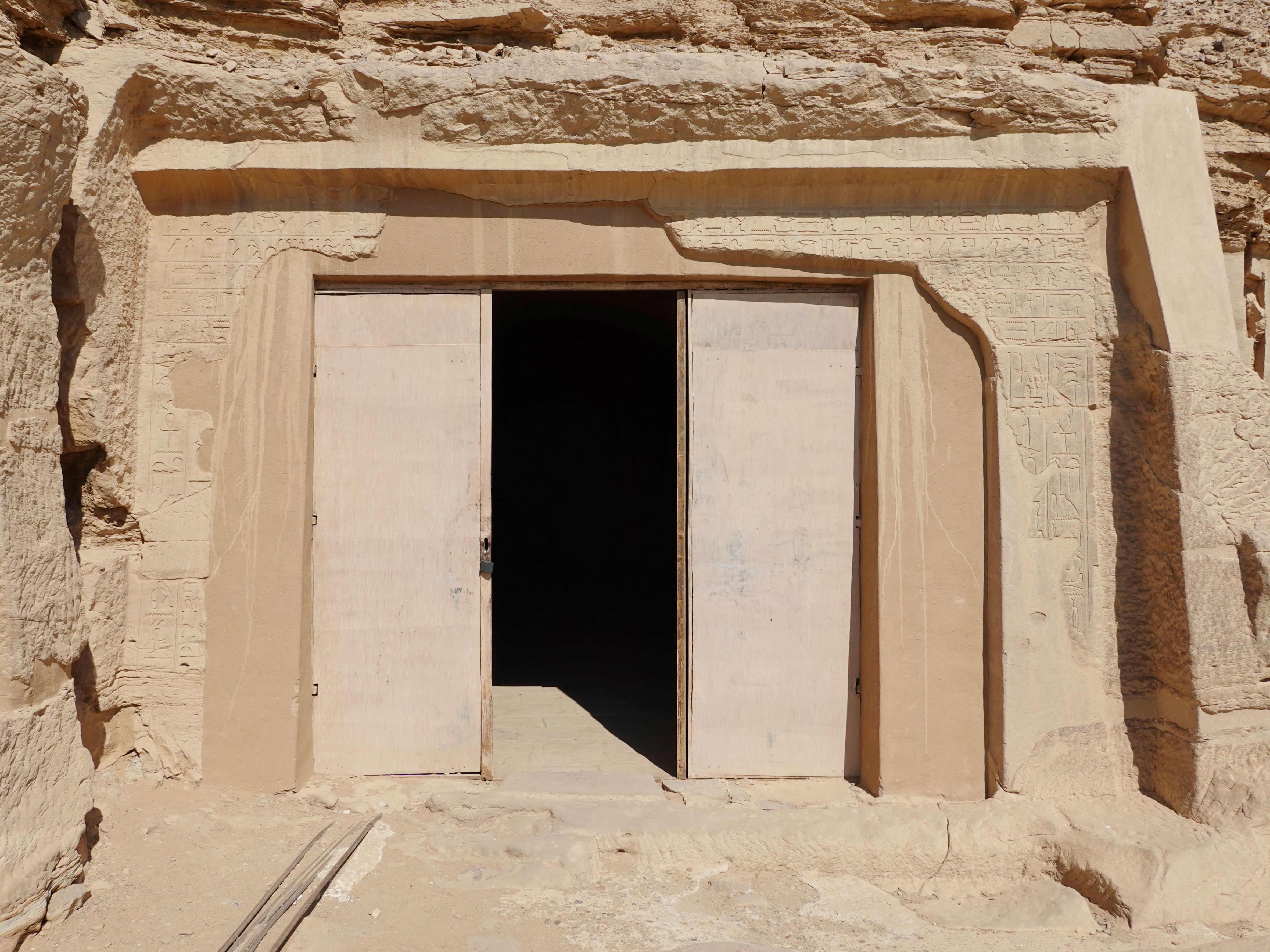 Eingang zum Felsengrab des Renni unter den Felsengräbern des altägyptischen Necheb bei el-Kab, Ägypten